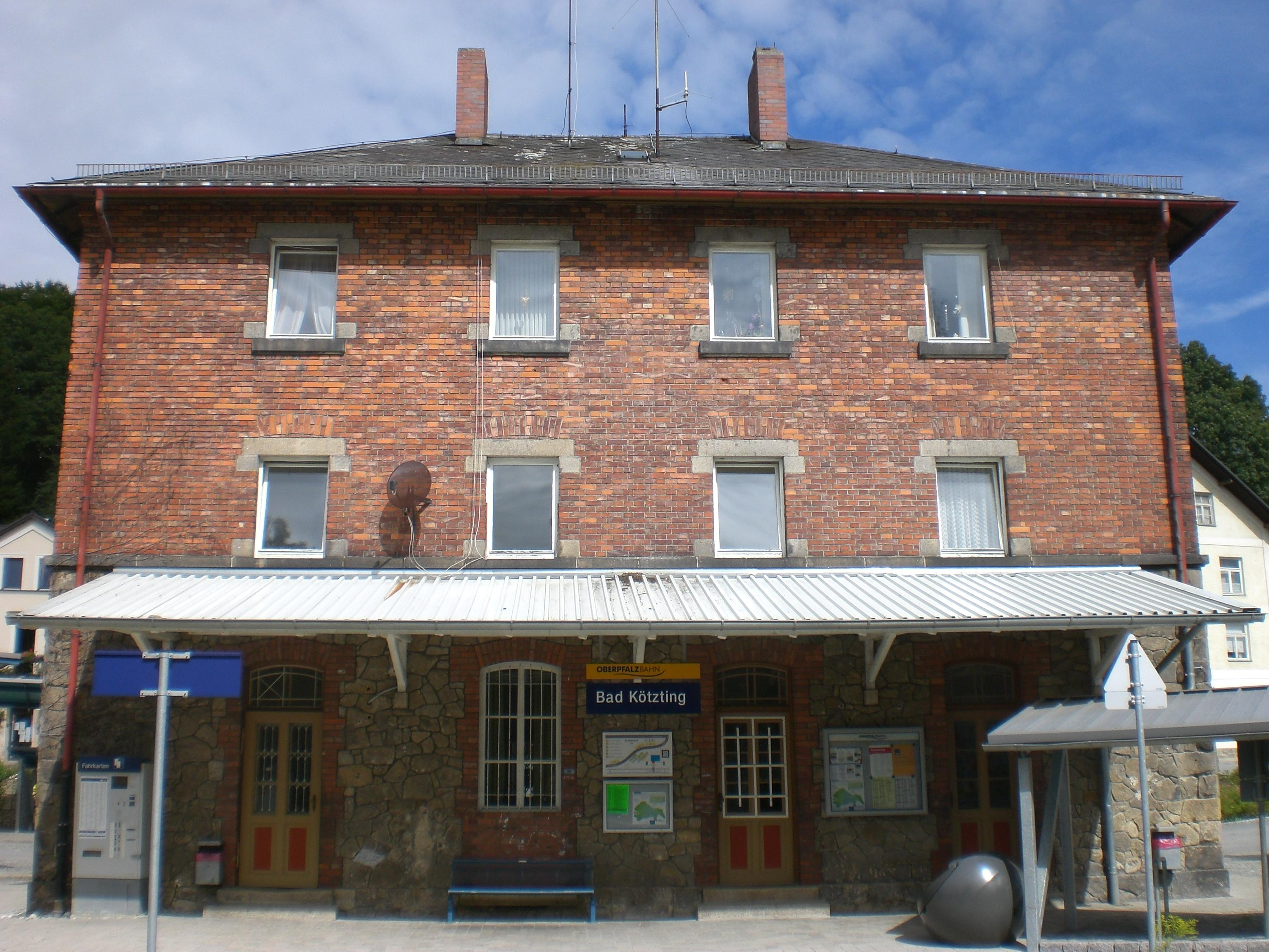 Bahnhofsgebäude Bad Kötzting